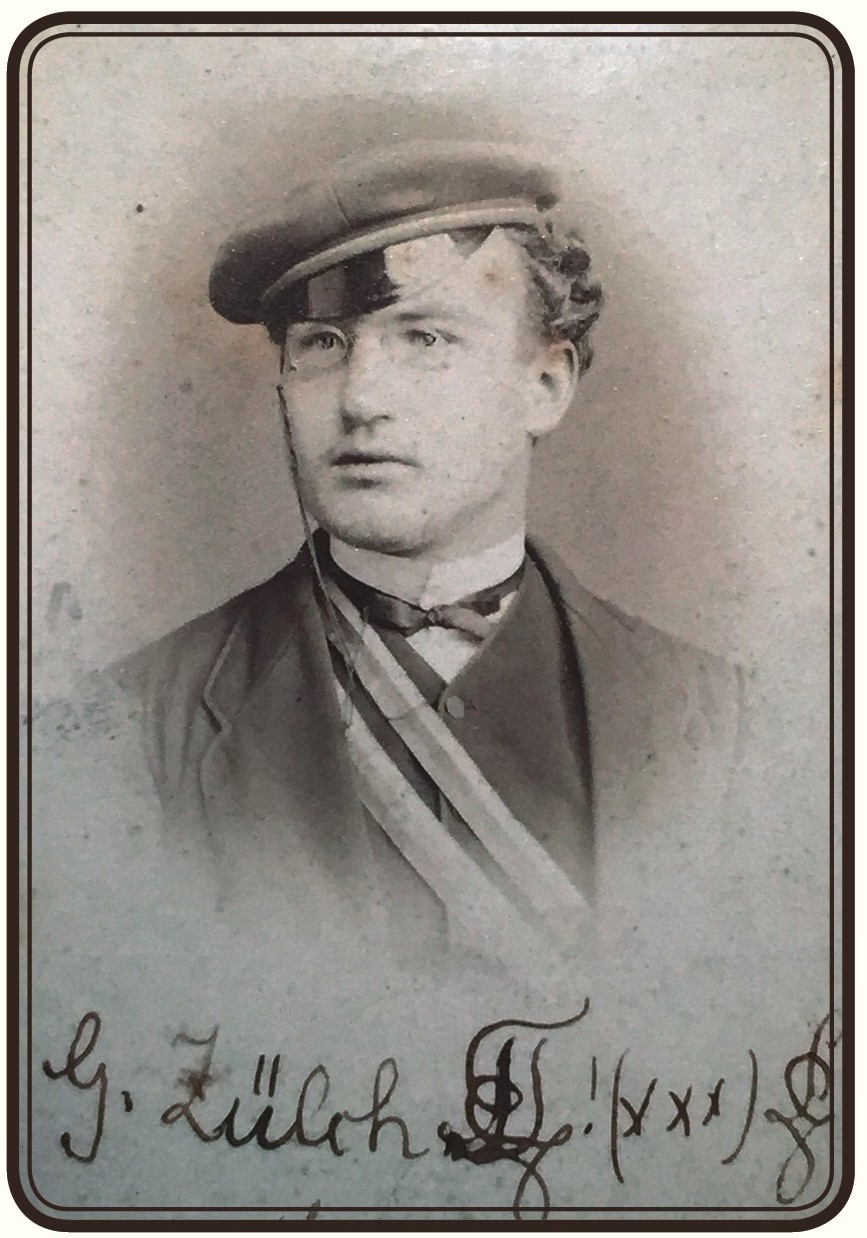 Porträtfotografie von Georg Zülch